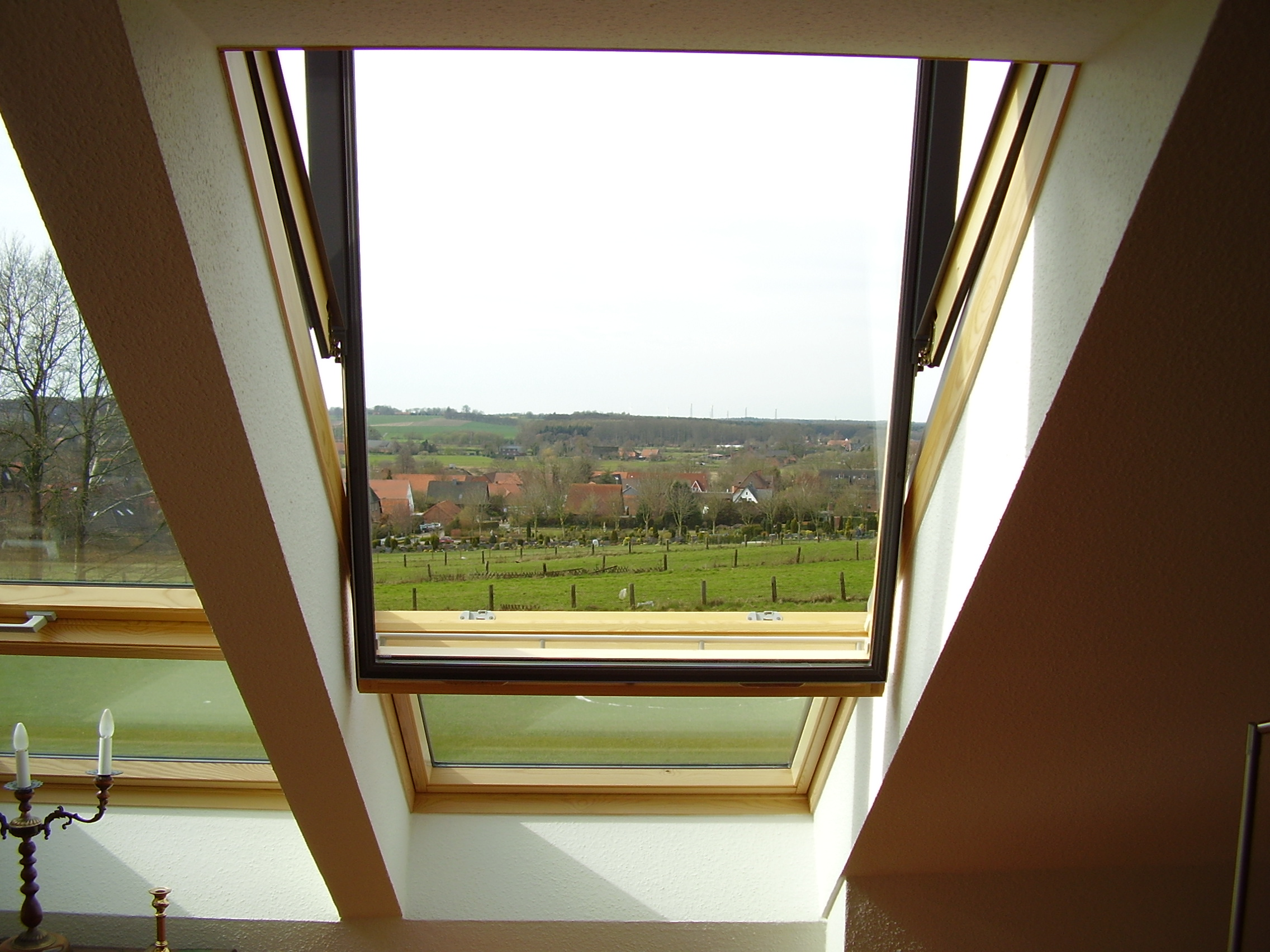 Velux-Dachfenster